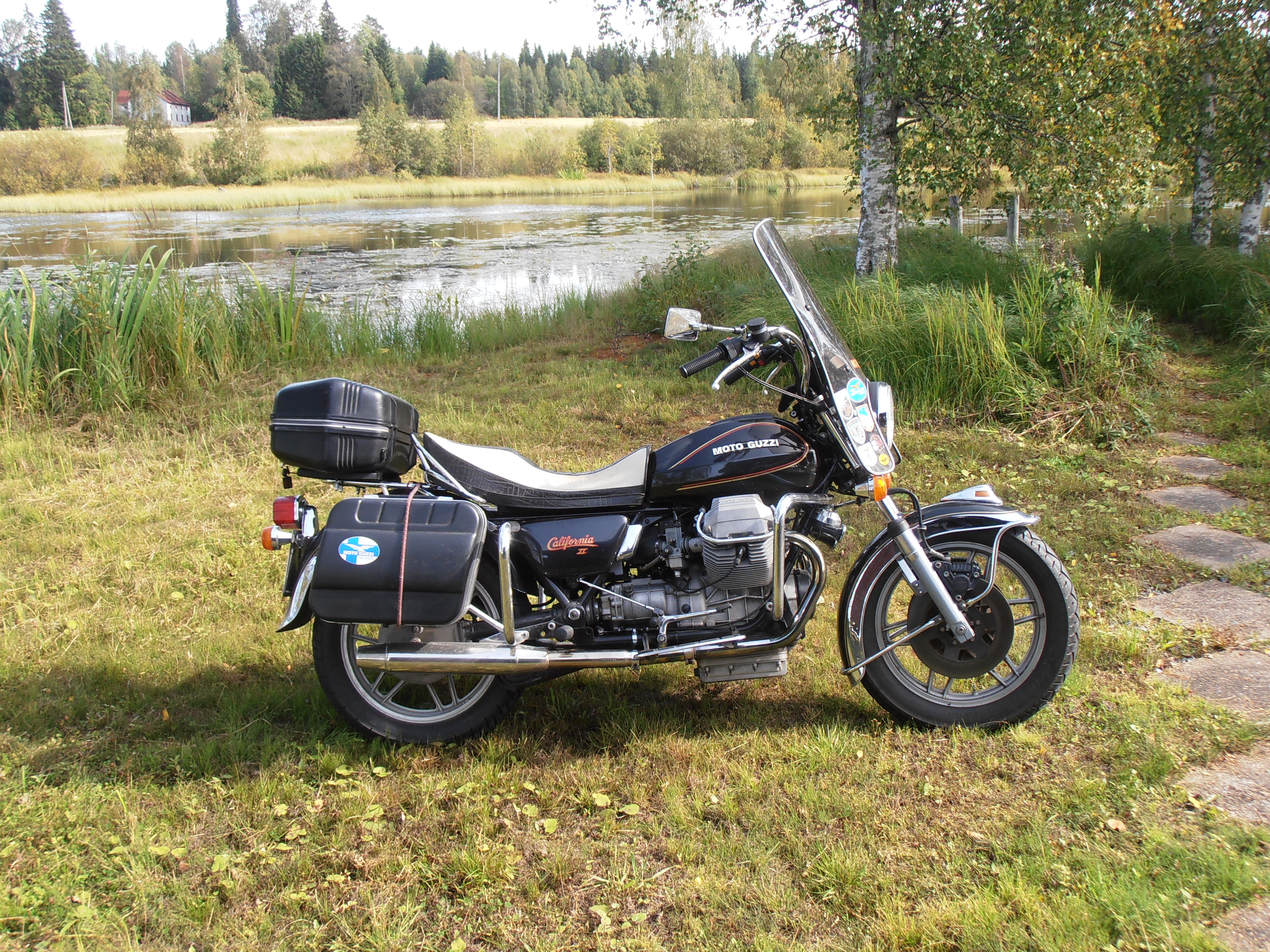 Moto Guzzi California II (1986) Suomessa maaseudulla